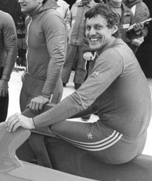 Dietmar Schauerhammer bei der DDR-Meisterschaft im Viererbob auf der Rennschlitten- und Bobbahn Altenberg, 22.3.87